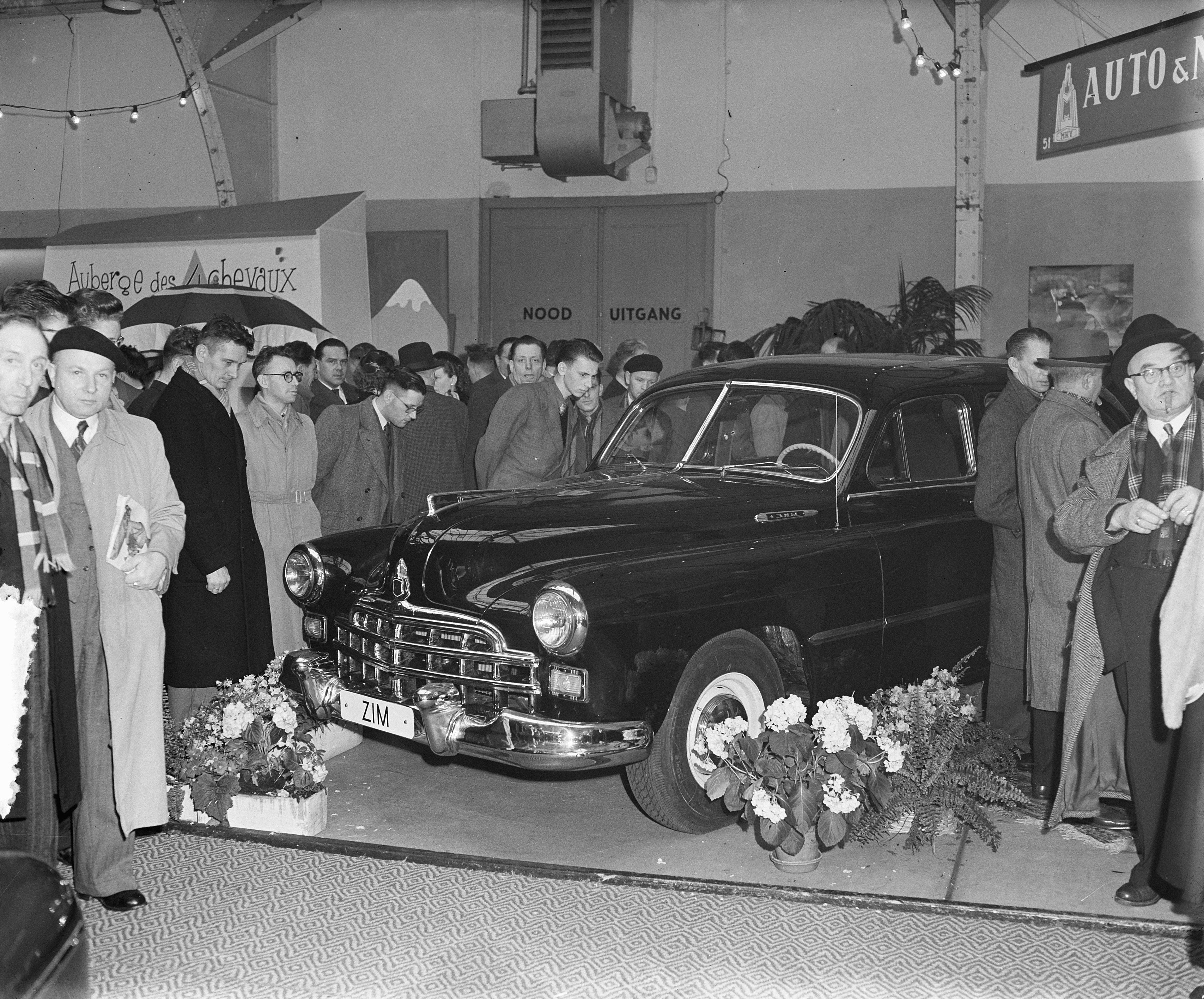 Collectie / Archief : Fotocollectie Anefo Reportage / Serie : [ onbekend ] Beschrijving : Russische autos op de Rai Datum : 7 maart 1954 Locatie : Amsterdam, Noord-Holland Trefwoorden : auto's Instellingsnaam : RAI Fotograaf : Rossem, Wim van / Anefo Auteursrechthebbende : Nationaal Archief Materiaalsoort : Glasnegatief Nummer archiefinventaris : bekijk toegang 2.24.01.09 Bestanddeelnummer : 906-3269